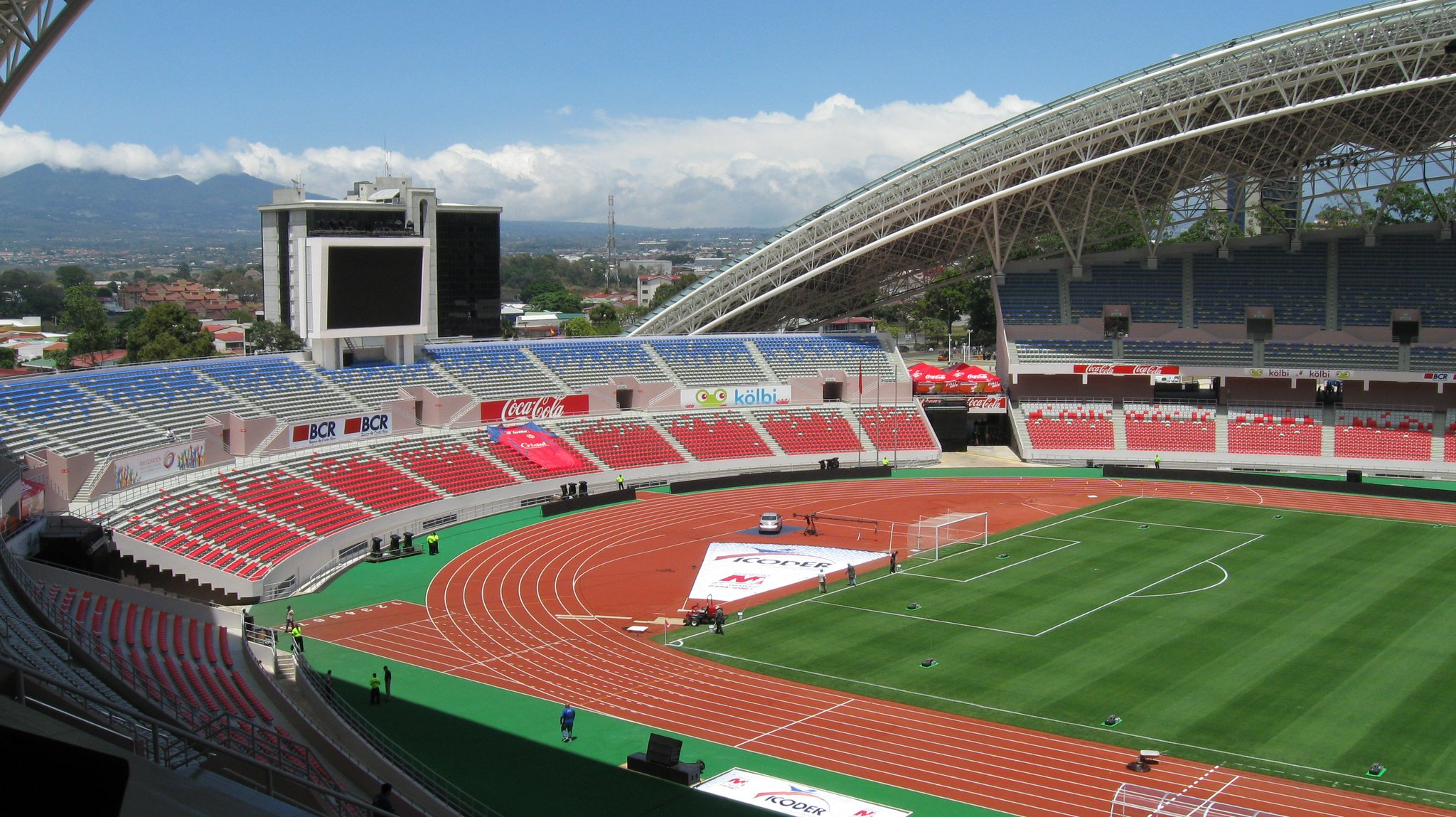 Vista del Nuevo Estadio Nacional de Costa Rica inaugurado el 26 de marzo del 2011